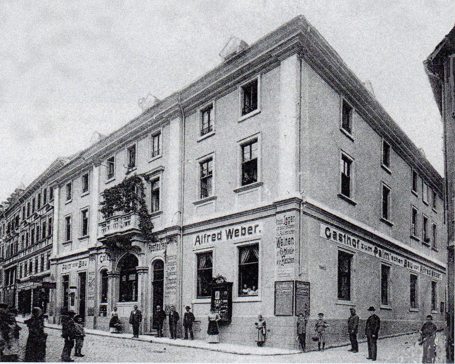 Palmscher Bau (Innere Brücke 2) in Esslingen